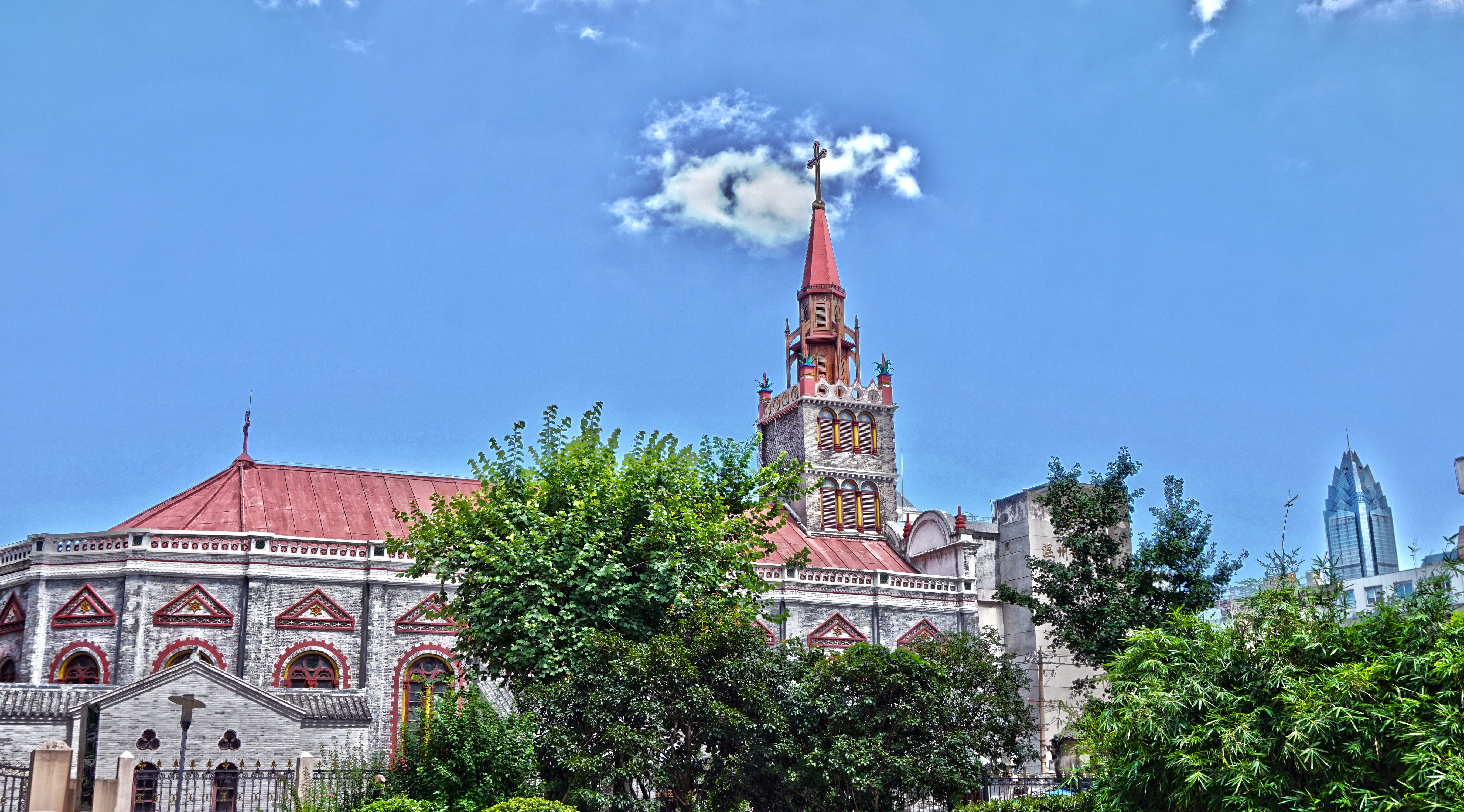 温州天主教总堂。